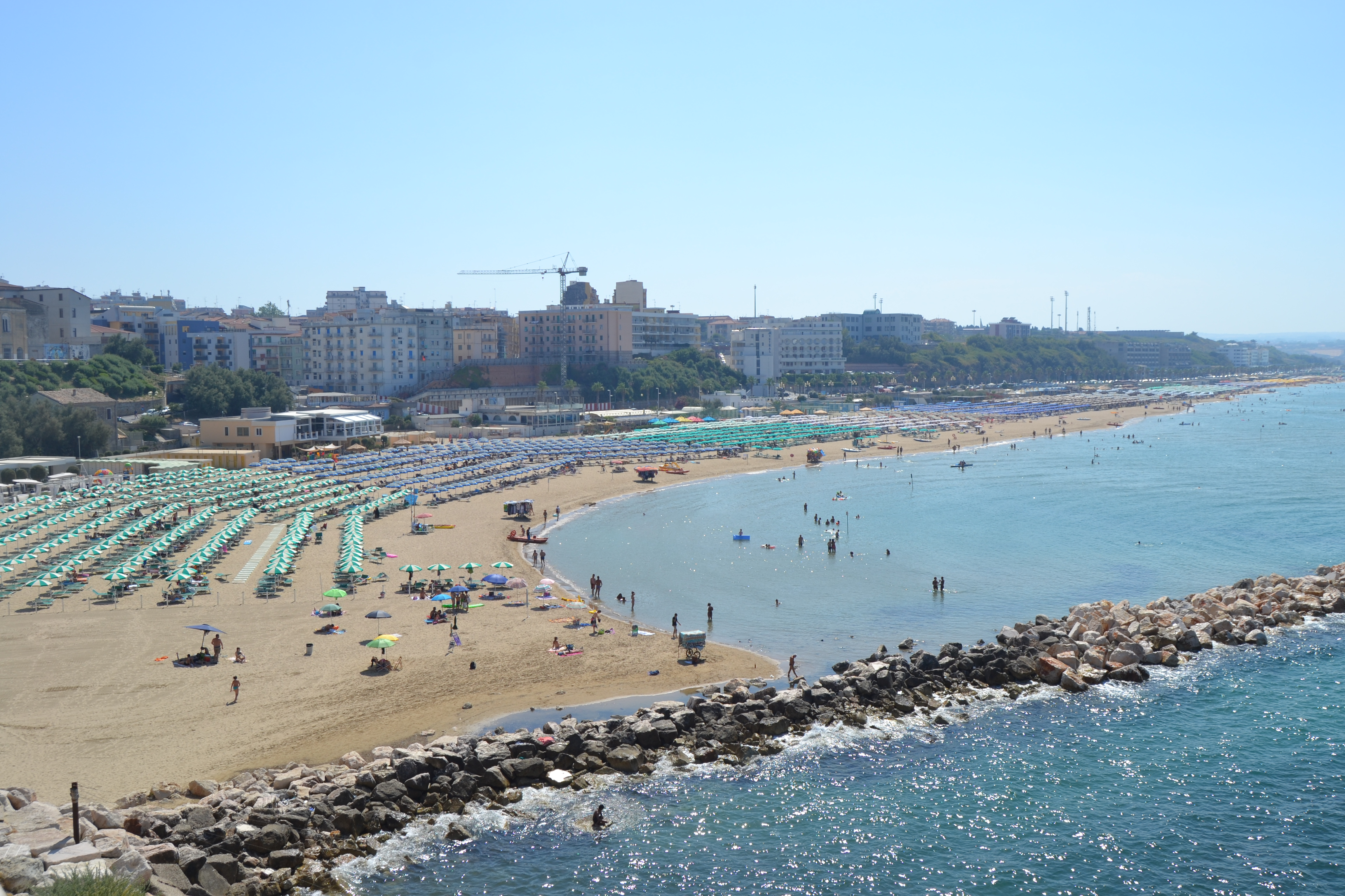 Veduta della spiaggia di termoli dal centro